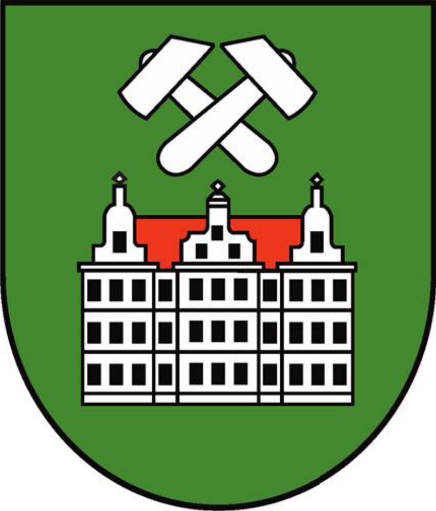 Herb gminy Tworóg